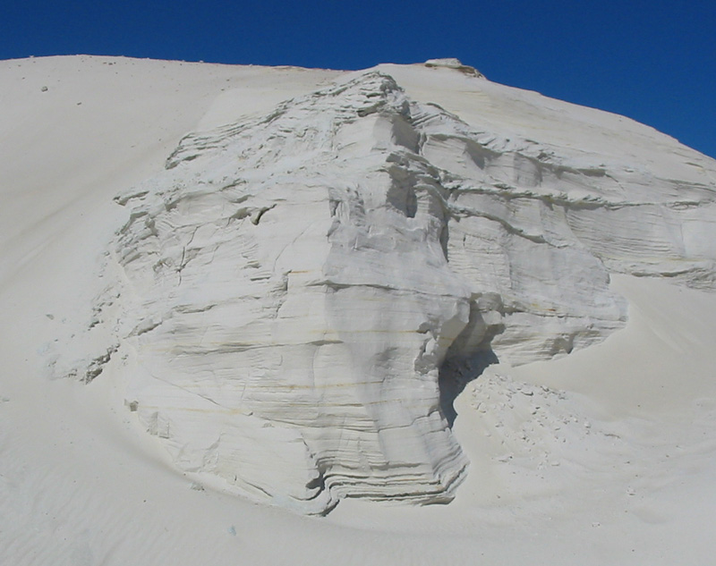 Kvartsliiv Tabina karjääris